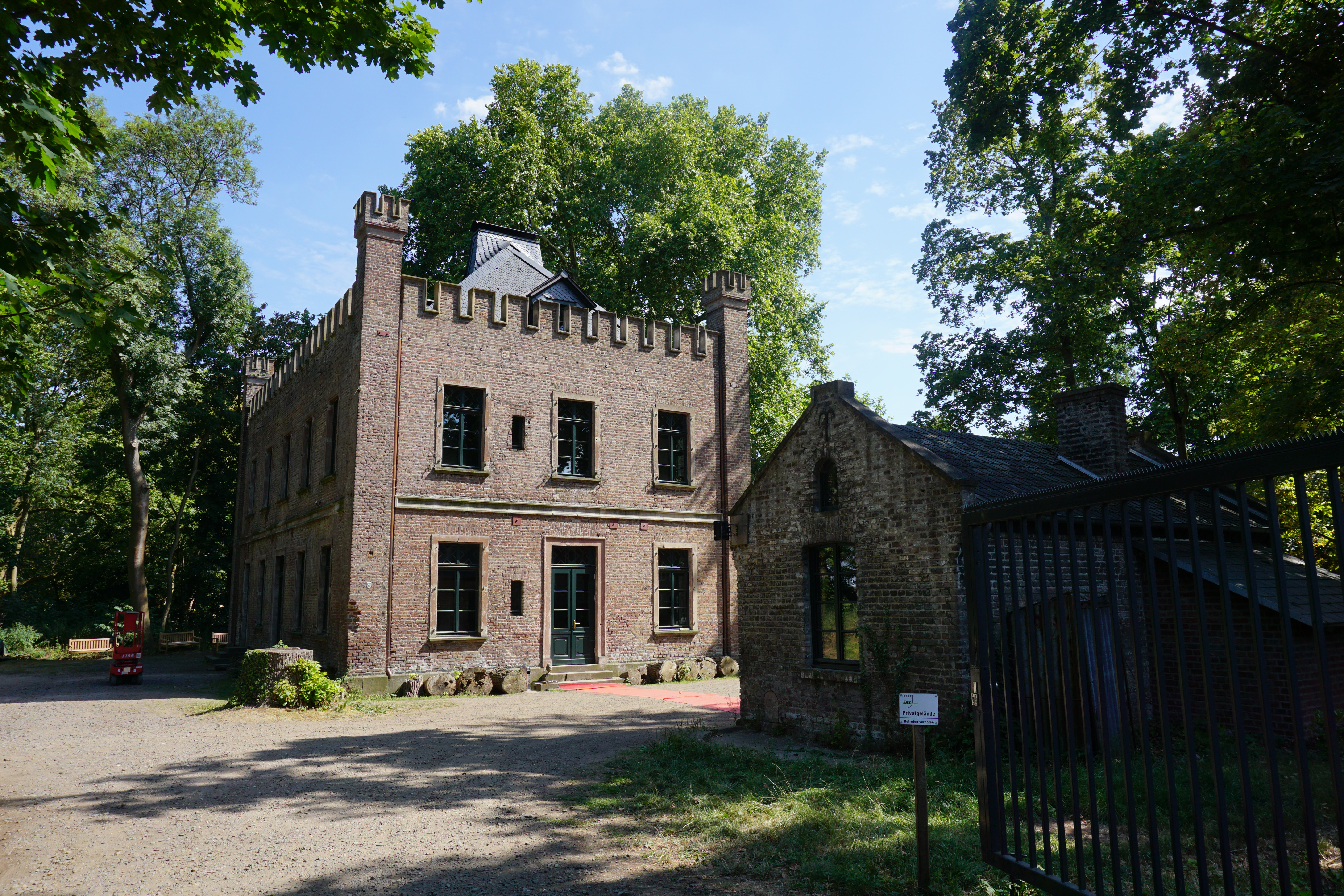 Haus Orr in Pulheim This is a photograph of an architectural monument. /083